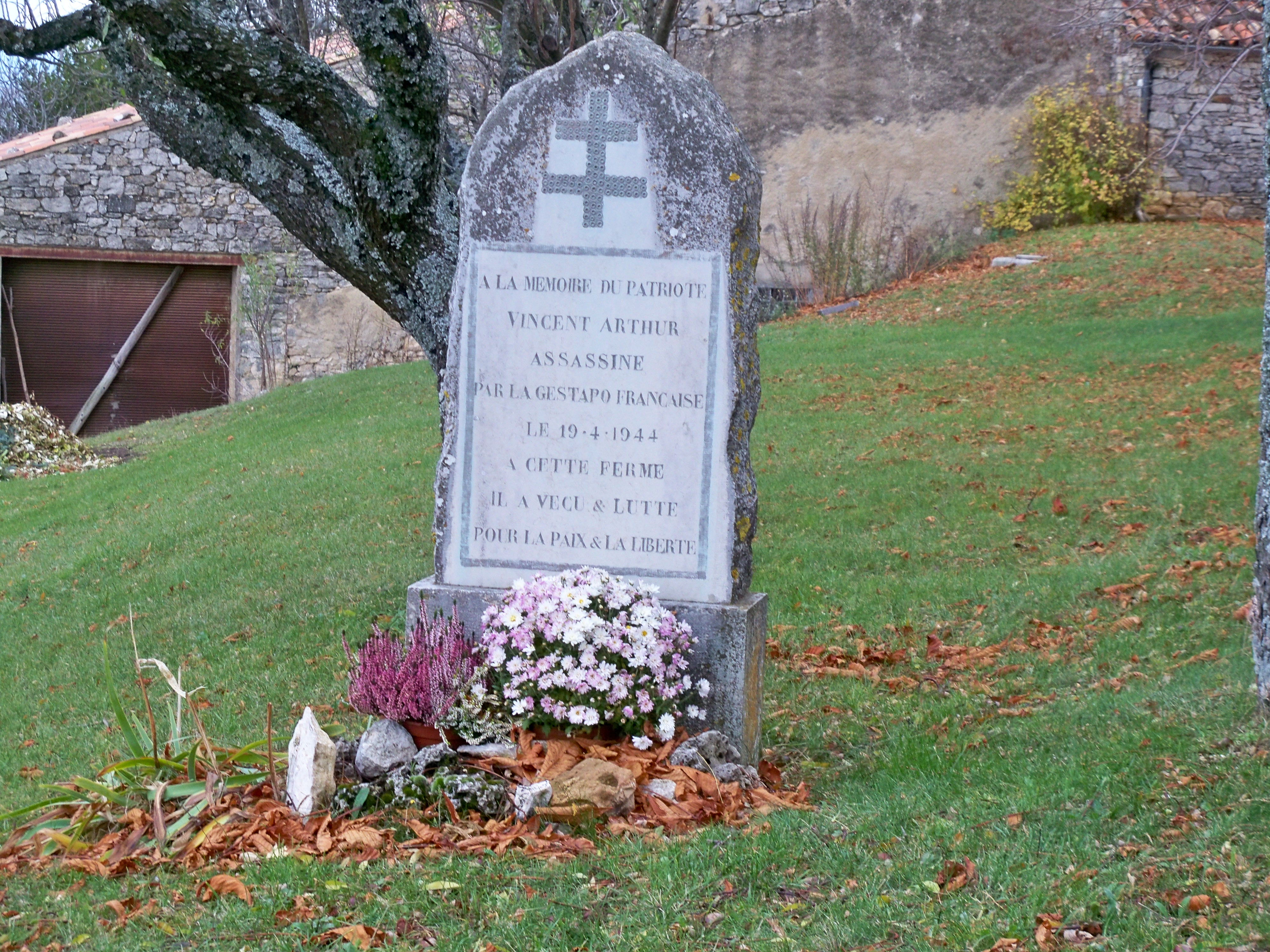 mémorial à Vachères (04)